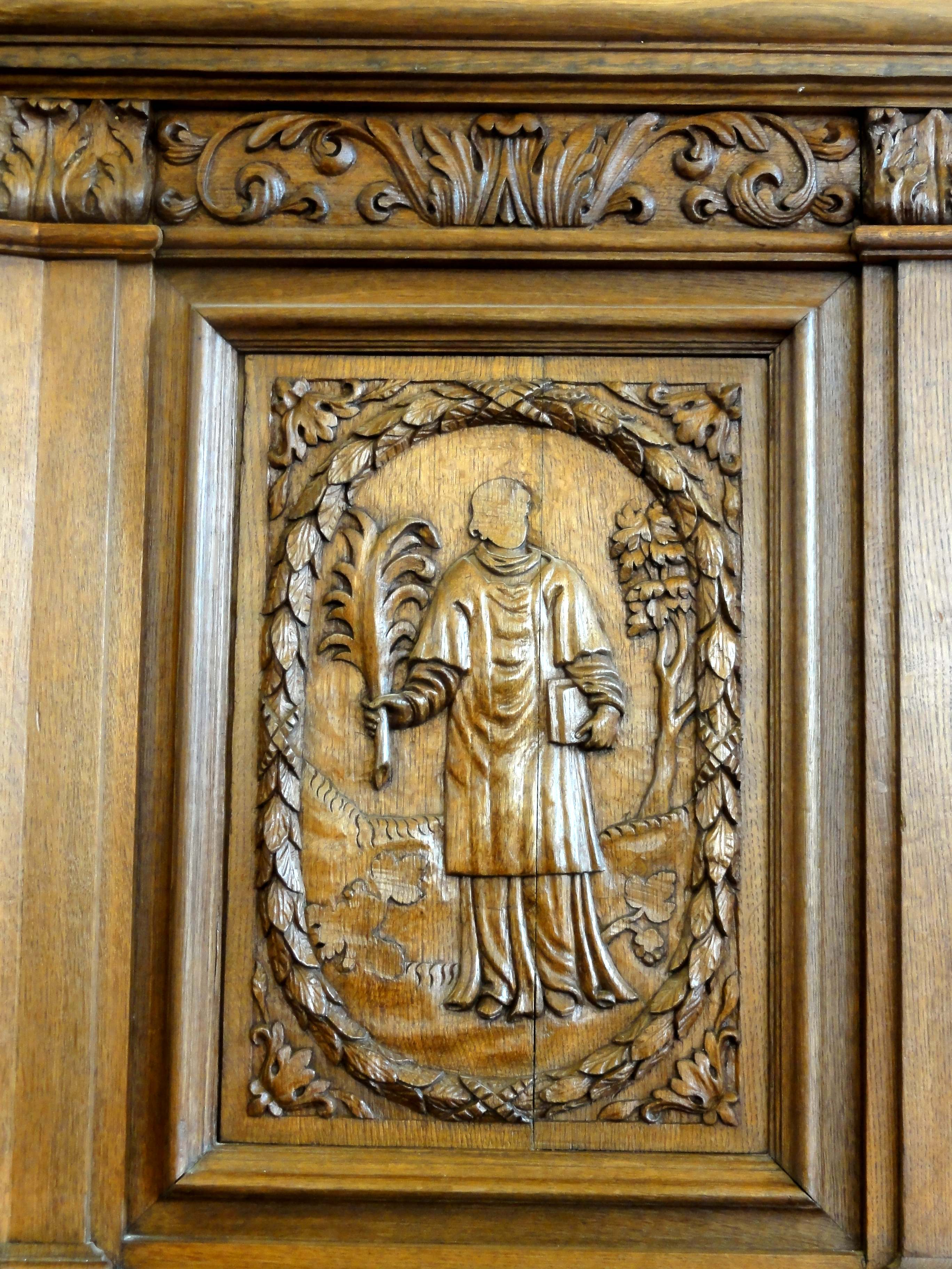 Mobilier de l'église (voir titre).